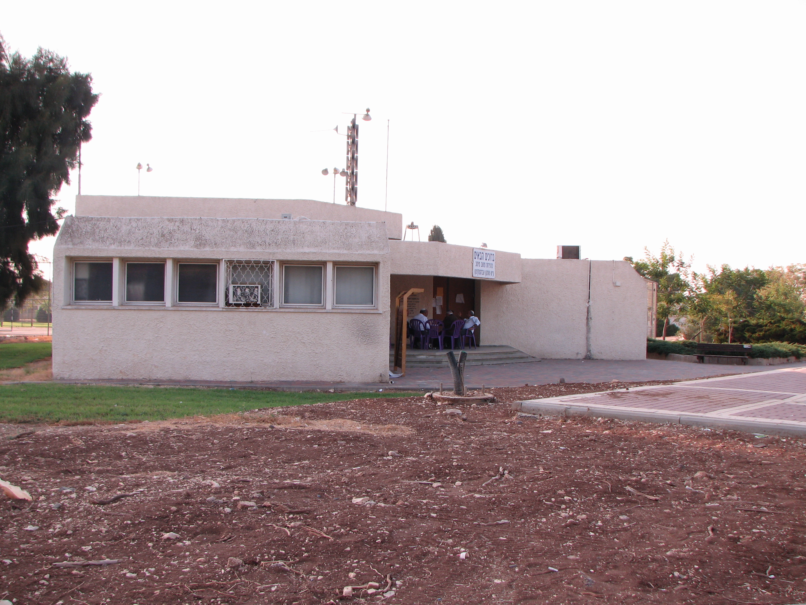 מזכירות מושב מיטב